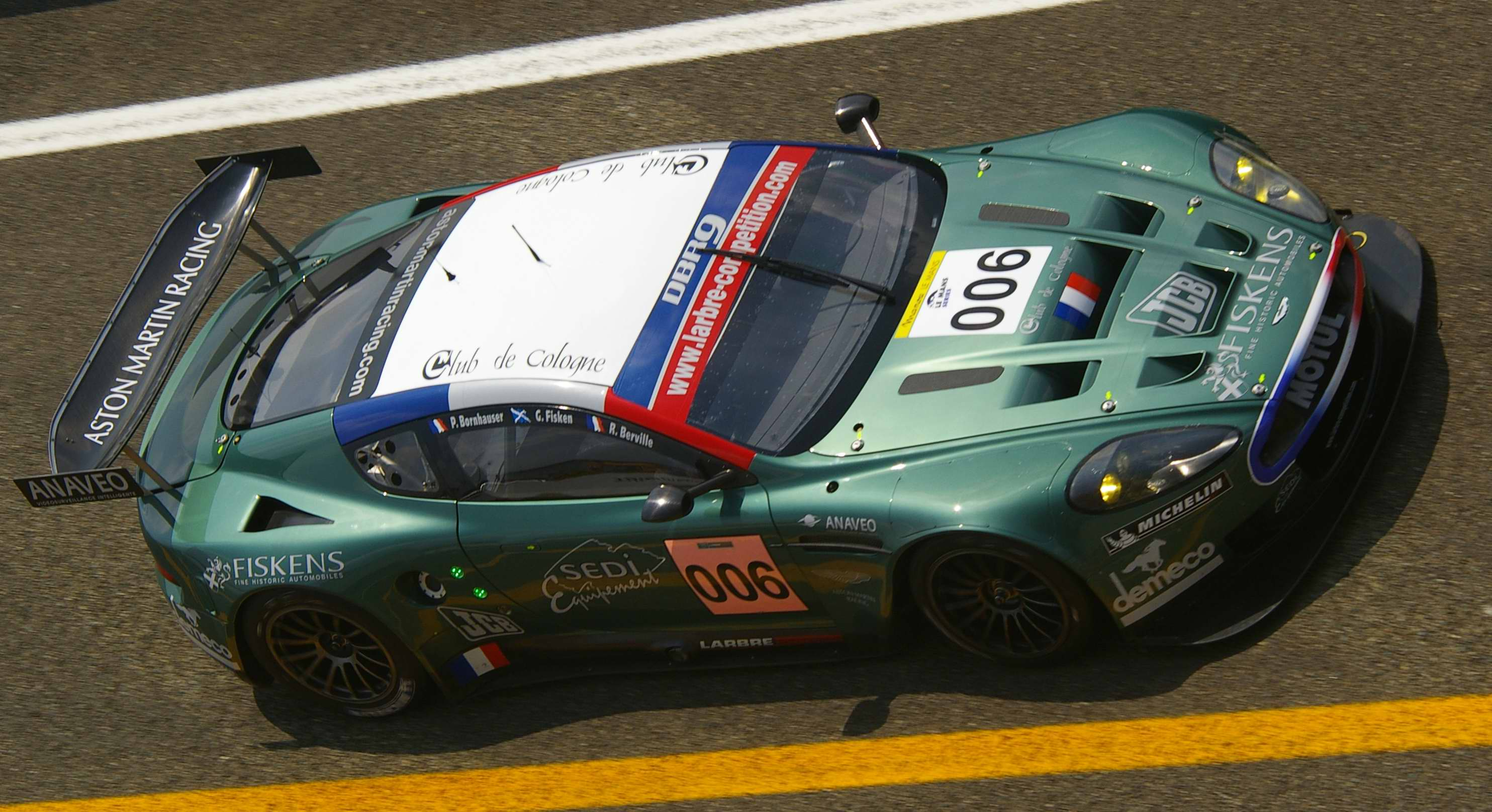 Entrée dans les stands de l'Aston Martin DBR9 de l'équipage 006 (Patrick Bornhauser, Roland Berville et Gregor Fisken) lors de la journée test des 24h du Mans du 03 juin 2007.